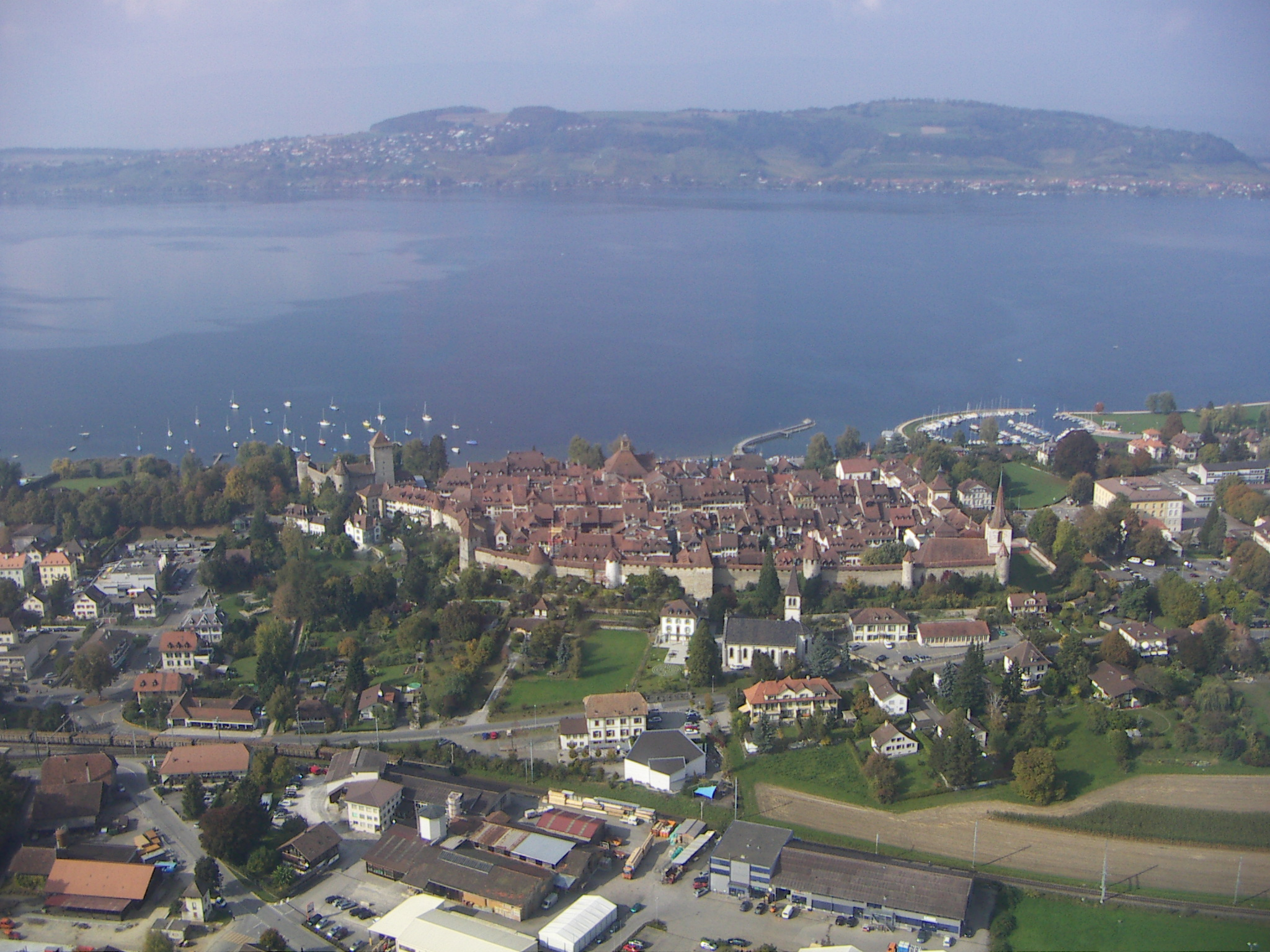 Luftbild der Altstadt von Murten. Im Hintergrund der Mont Vully